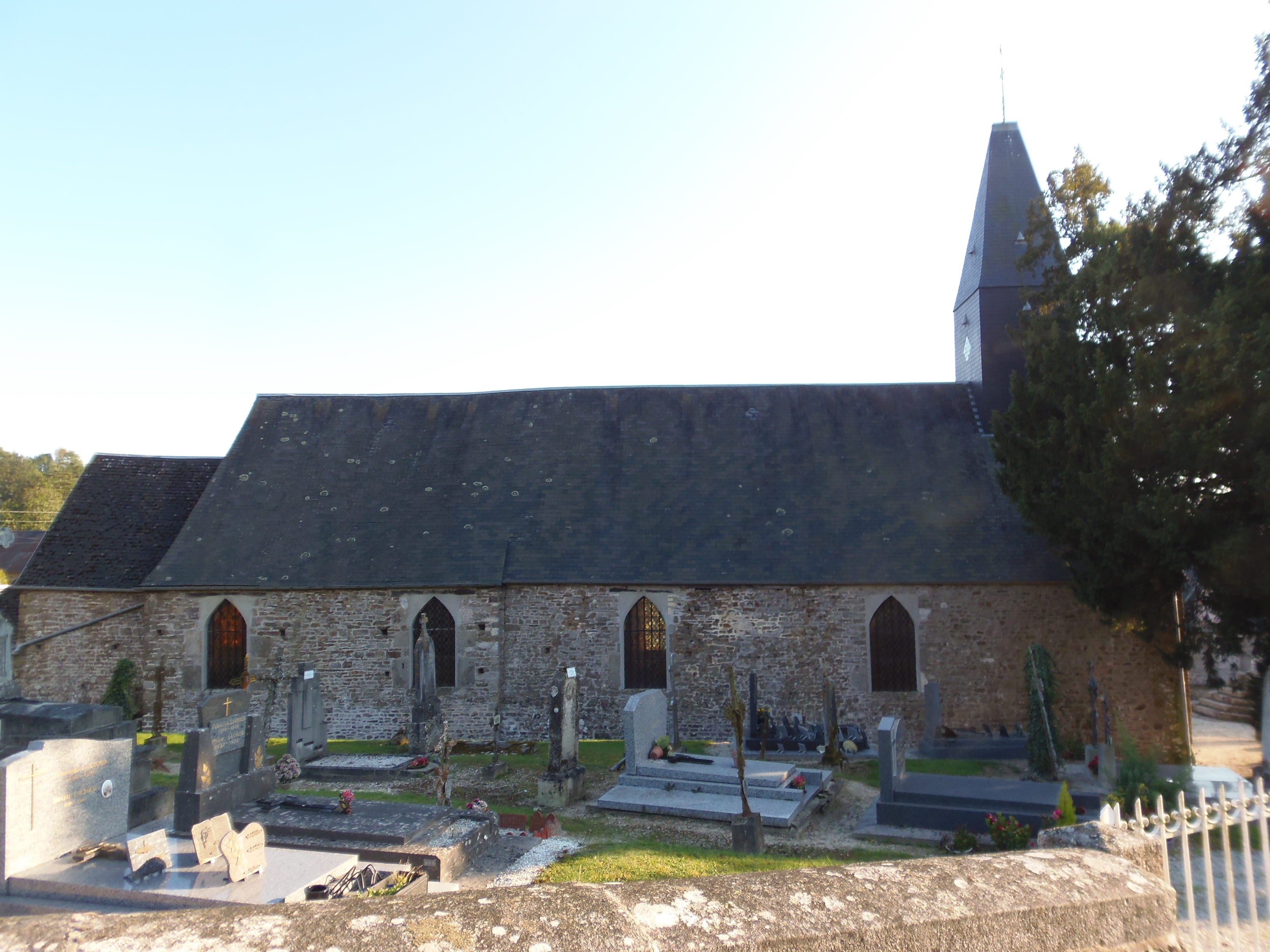 La Chapelle-Engerbold (Normandie, France). L'église Saint-Gerbold.